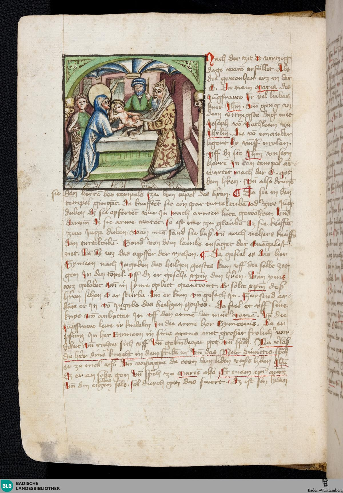 Sammelhandschrift, Lichtenthal 70, 1450/52, fol. 28v: Beschneidung Jesu in der deutschen Übersetzung Michaels de Massa 'Leben Jesu'